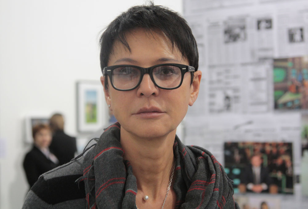 Ирина Муцуовна Хакамада